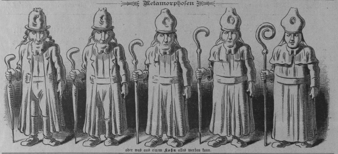 הכיתוב : למה יכול הקוהן להפוך